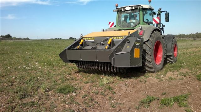 Ротоватор